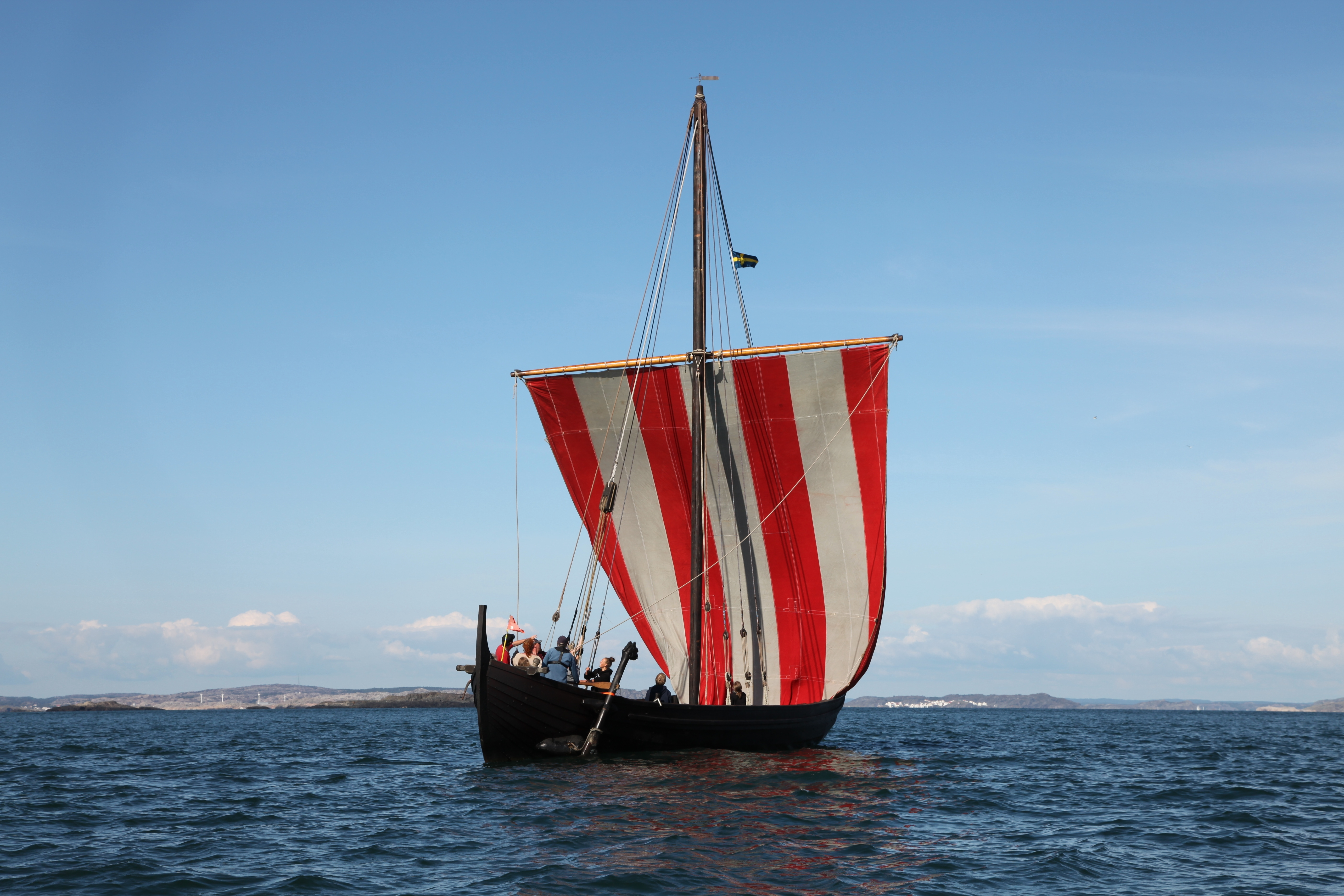 Vidfamne under hissande av rå och segel.